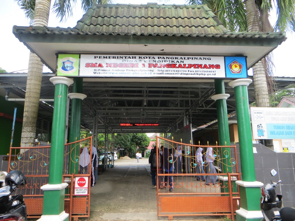 Gerbang Utama